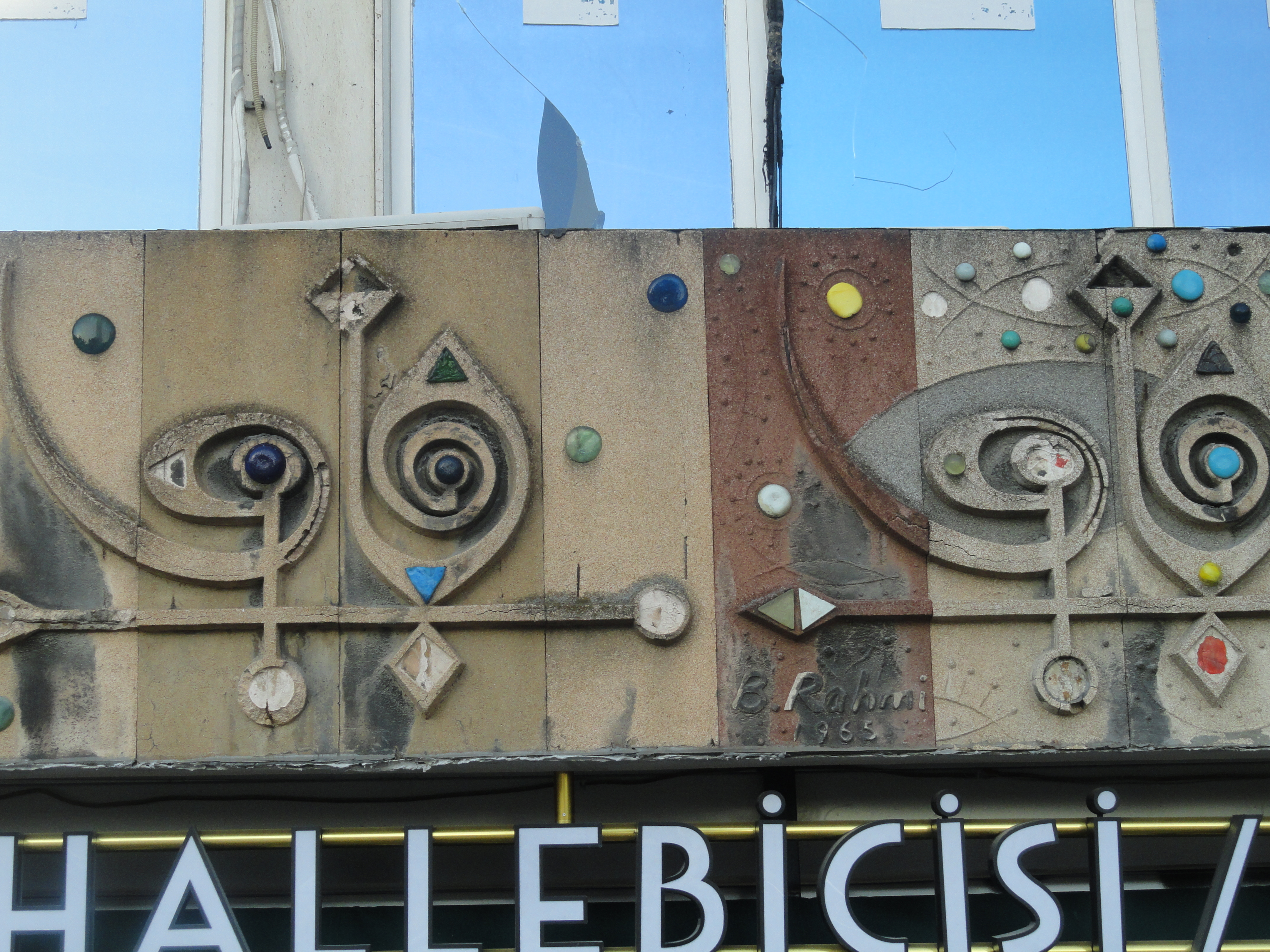 Karaköy Tatlıcılar Rölyefi, Bedri Rahmi Eyüboğlu, 1964-1965